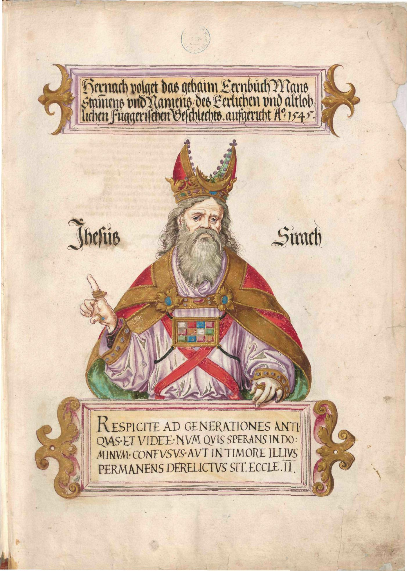 Geheimes Ehrenbuch der Fugger, hergestellt in der Werkstatt Jörg Breu d. J., 1545–1549 Erste Seite mit Darstellung des Hohepriesters Jesus Sirach